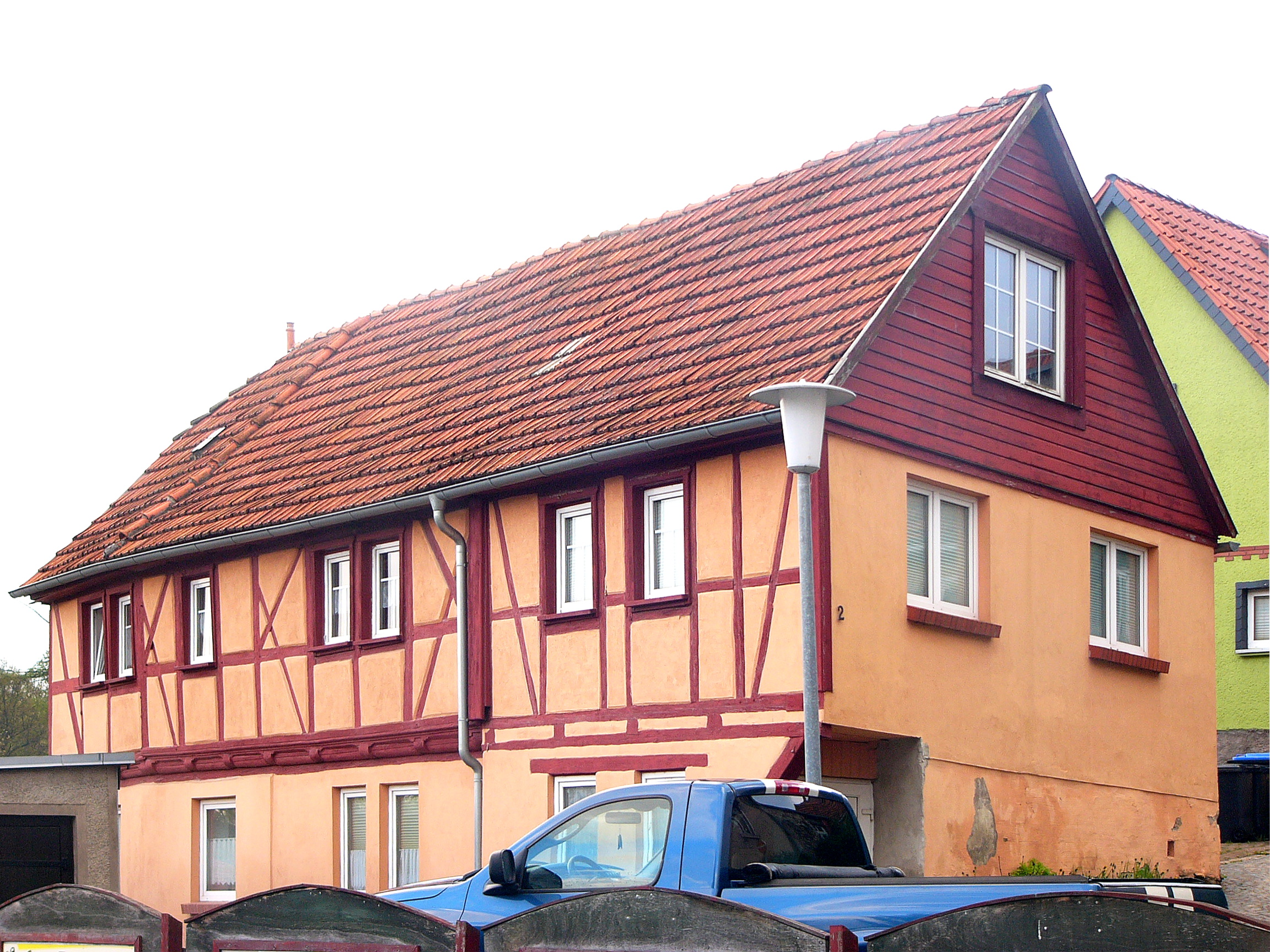 Um 1700; mit eines der ältesten erhaltenen Fachwerkhäuser der Vorstadt, mit Halbem Mann, gerundeten Balkenköpfen, Füllhölzern.